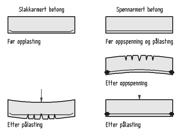 Prinsippskisse slakkarmering/spennarmering